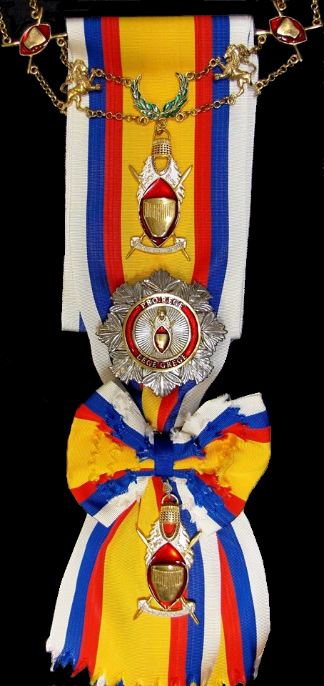 Royal Order of the Omujwaara Kondo